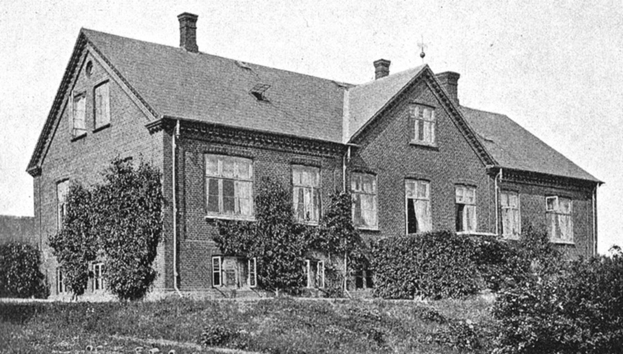 Vestergaard er en lille hovedgård, som er dannet i 1560 af landsdommer Gregers Juel. Vestergaard var en avlsgård under Tranekær Gods fra 1765 til 1931. Gården ligger i Humble Sogn, Langelands Sønder Herred, Sydlangeland Kommune. Hovedbygningen er opført i 1890.